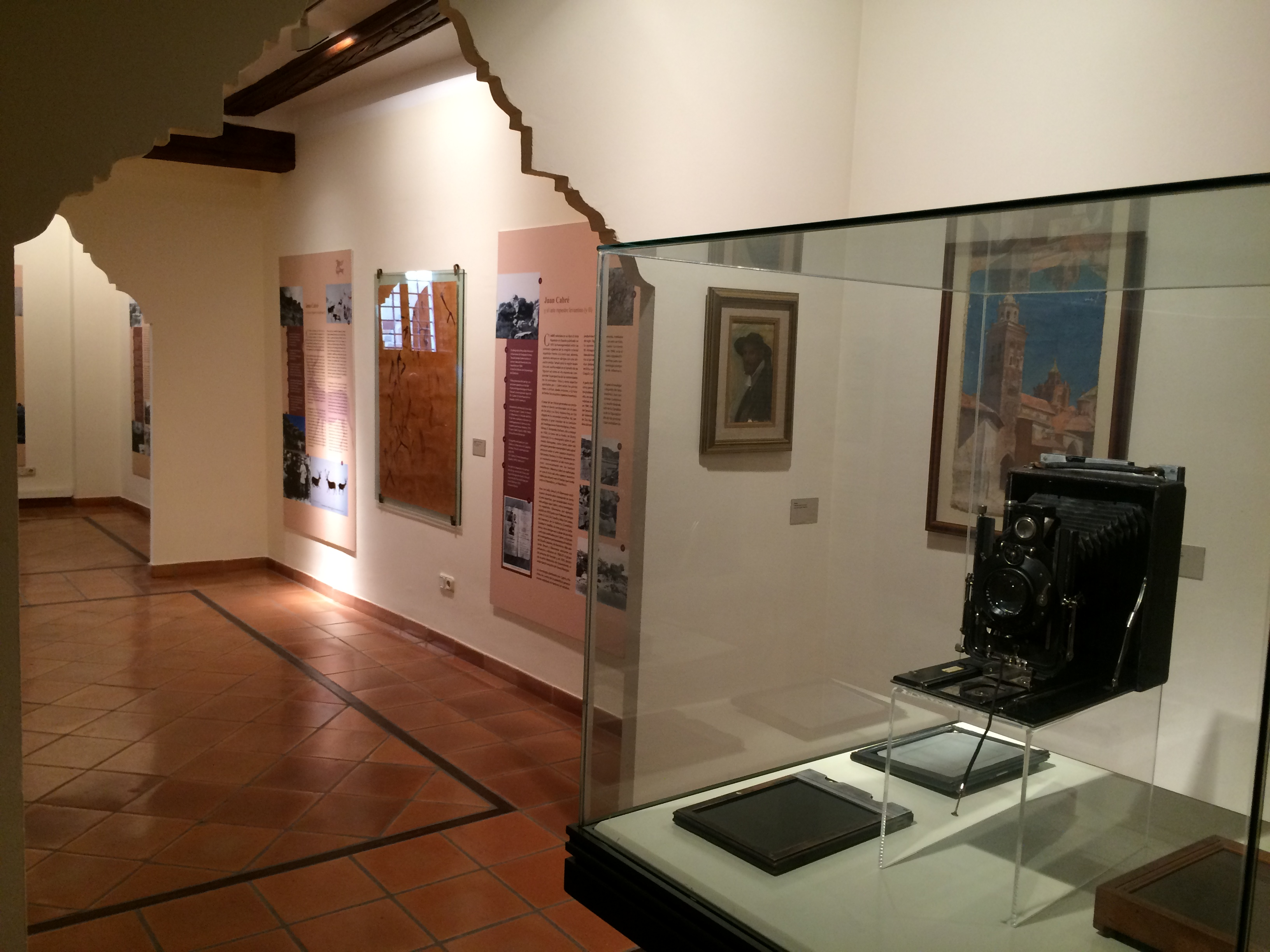 Museo Juan Cabre. Salas interiores.